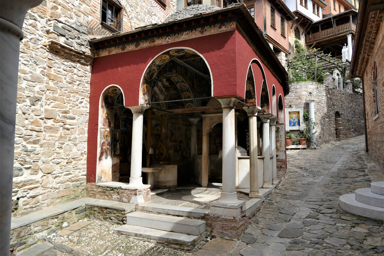 Μονή Δοχειαρίου«Μονή Δοχειαρίου»